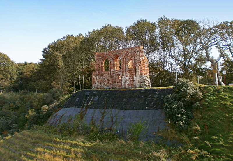 Trzęsacz, klif, ruiny kościoła